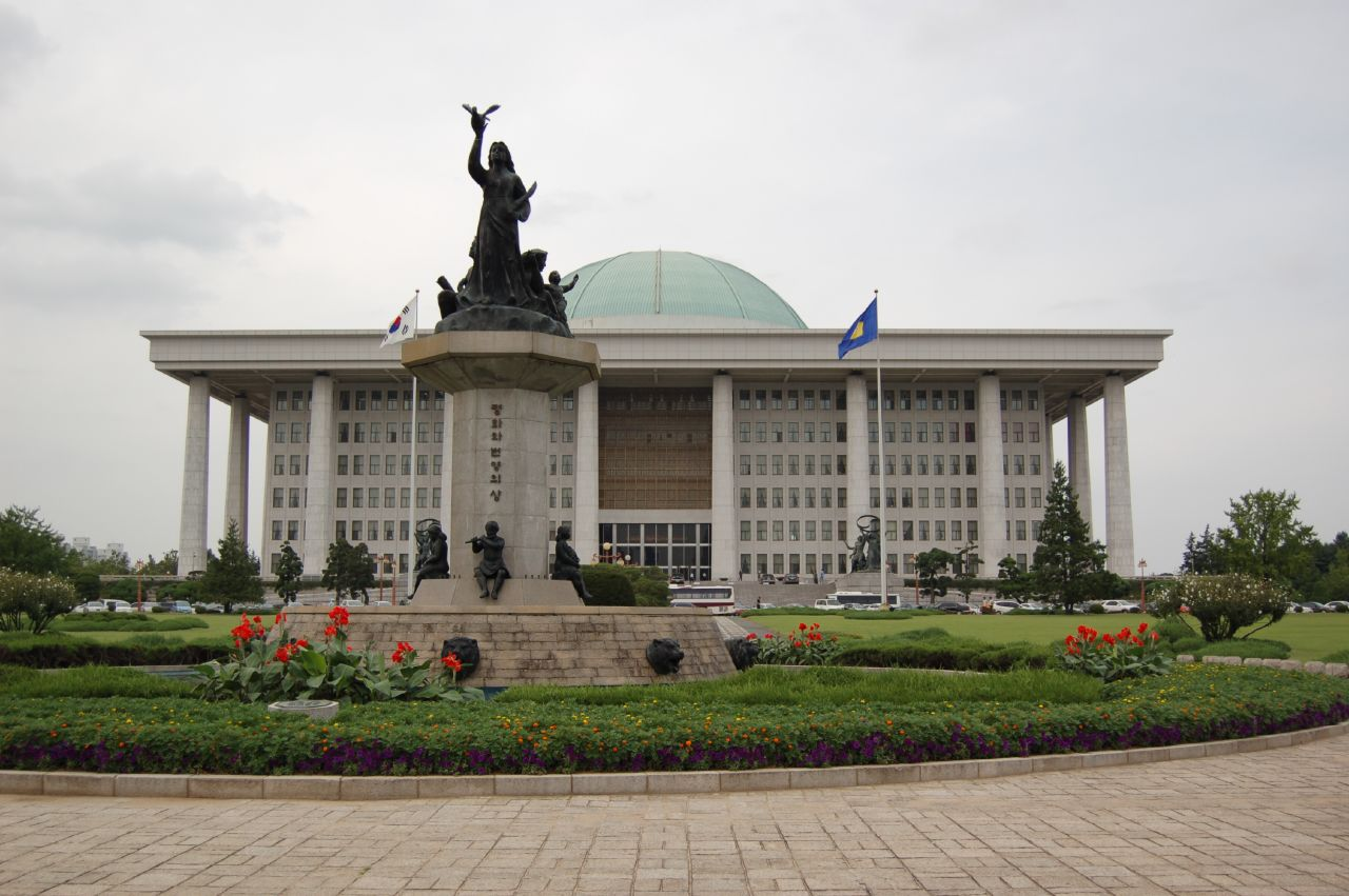 서울, 여의도에 위치한 국회의 모습 , National Assembly of South Korea located in Yeido, Seoul.